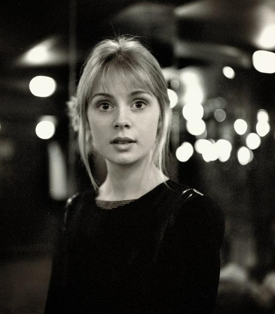 Российская актриса Алла Юганова.